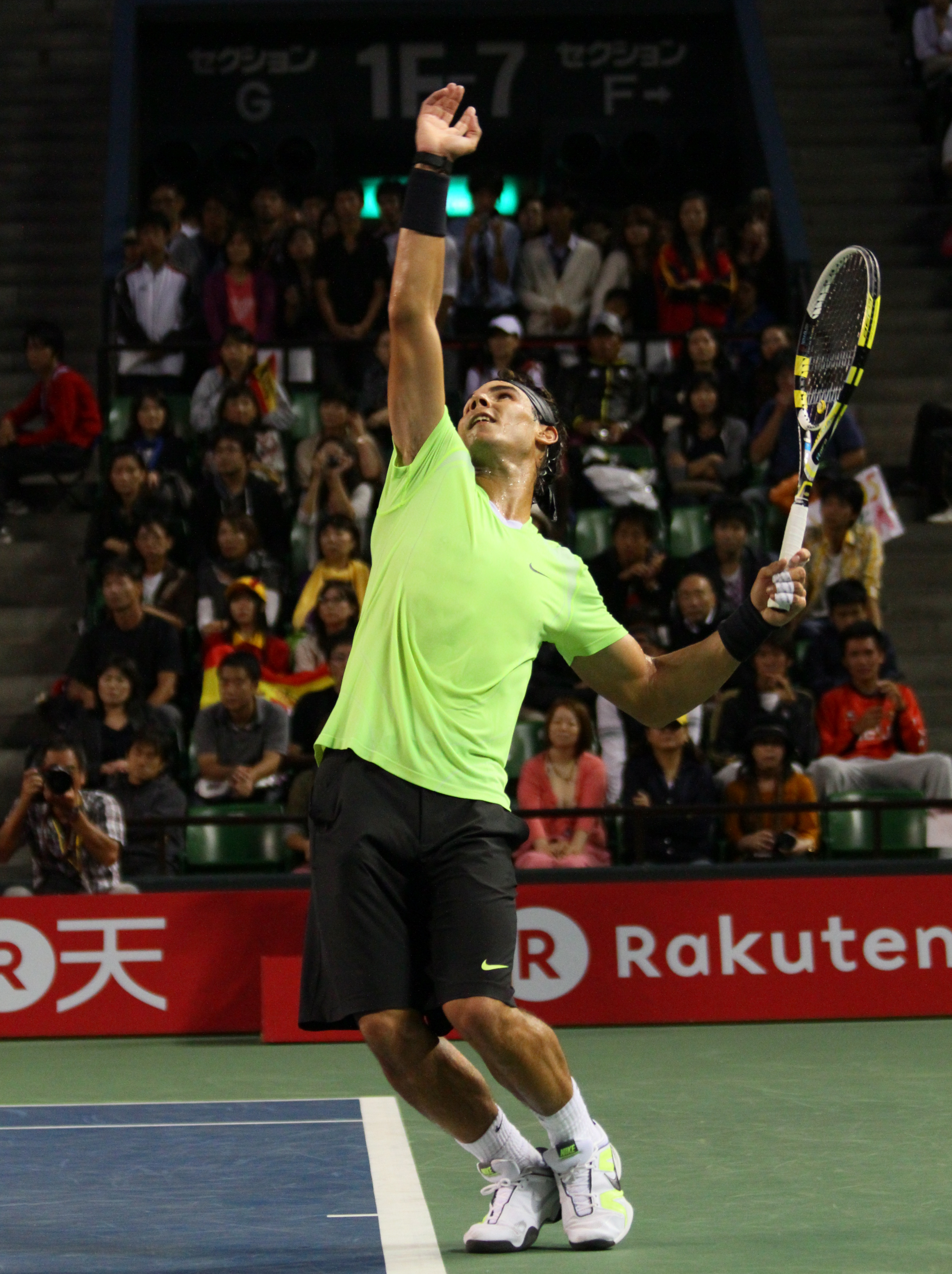 Rafael Nadal, en el torneo ATP de Tokio 2010.